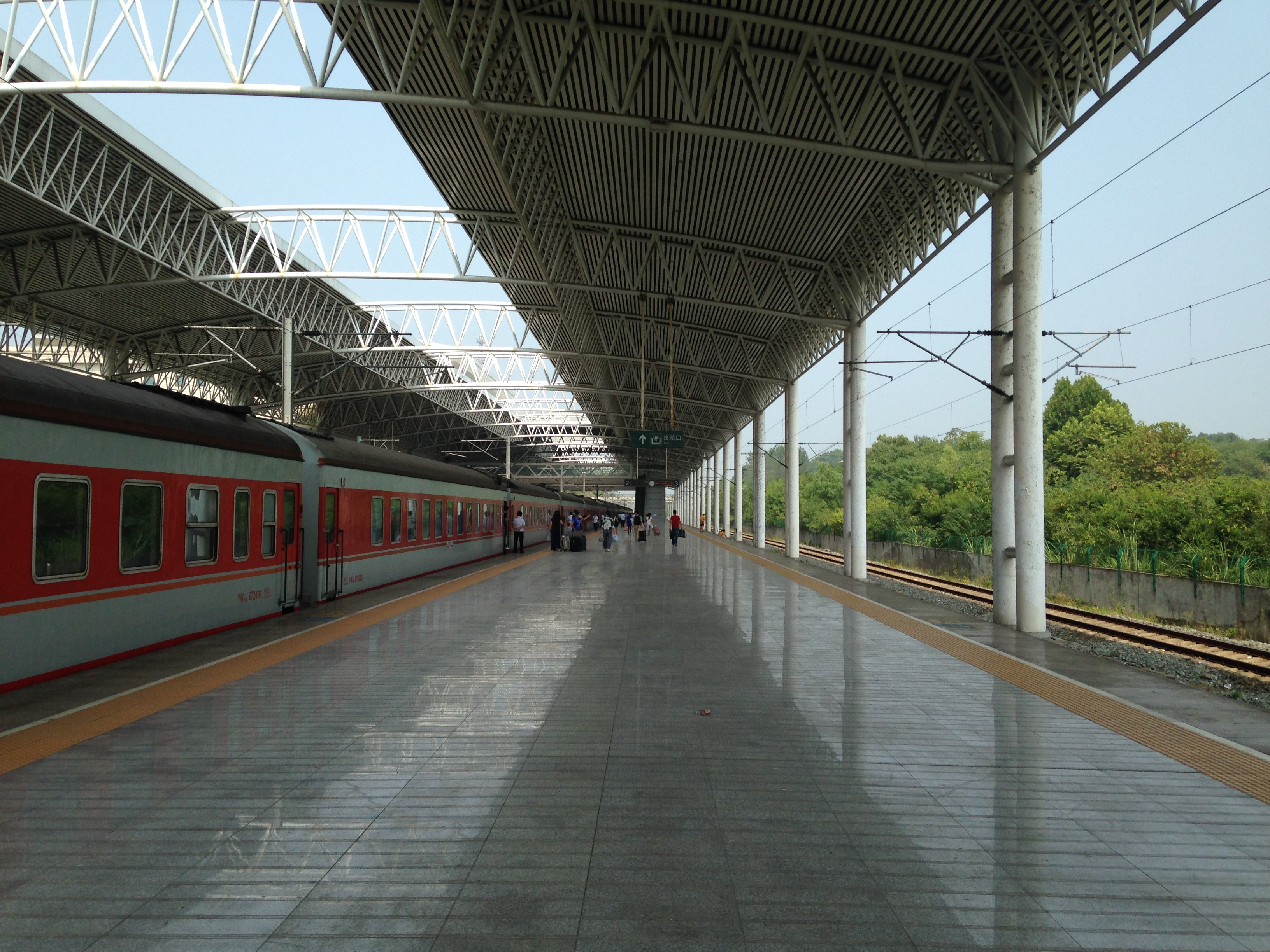 黄州駅のホーム